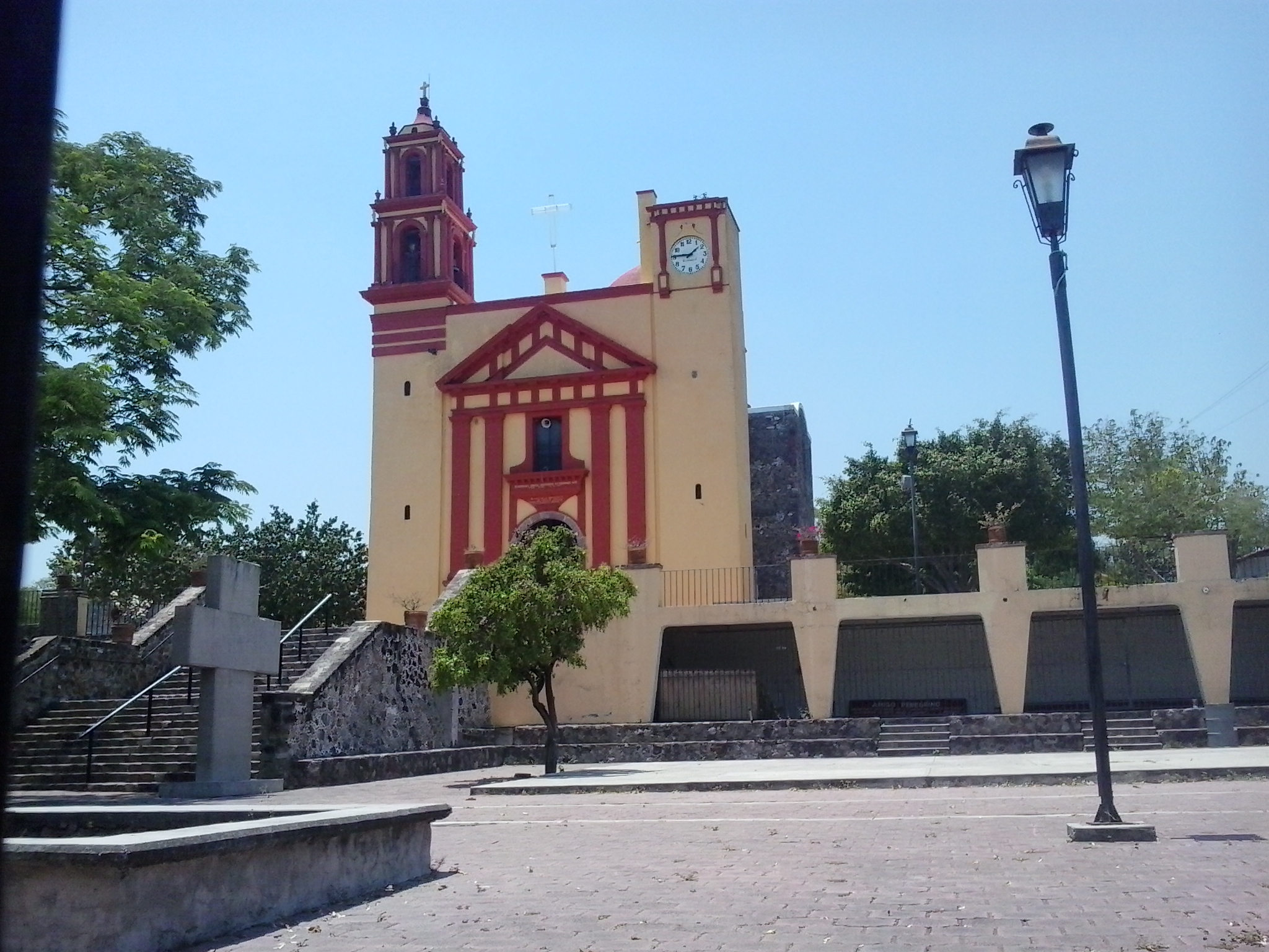 Vista frontal